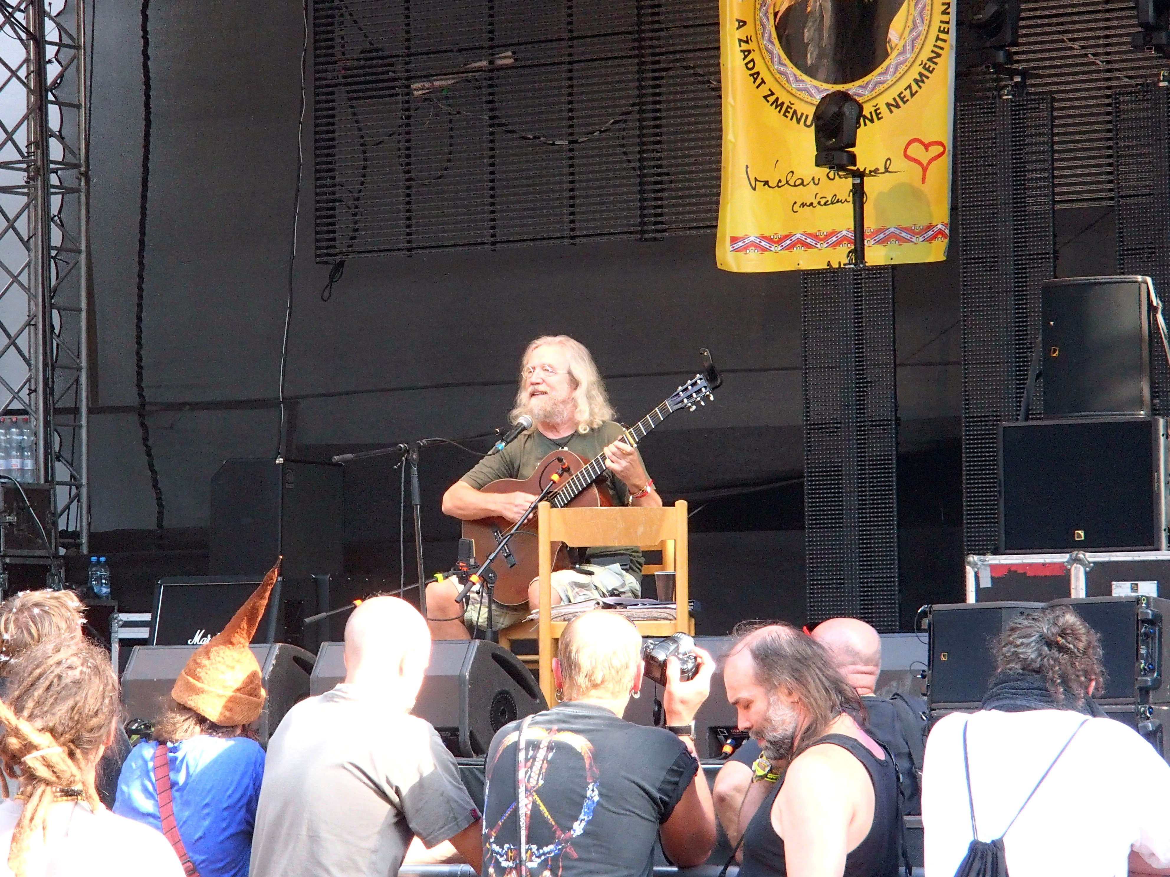 Trutnov Open Air Music Festival 2012 - Jaroslav Hutka